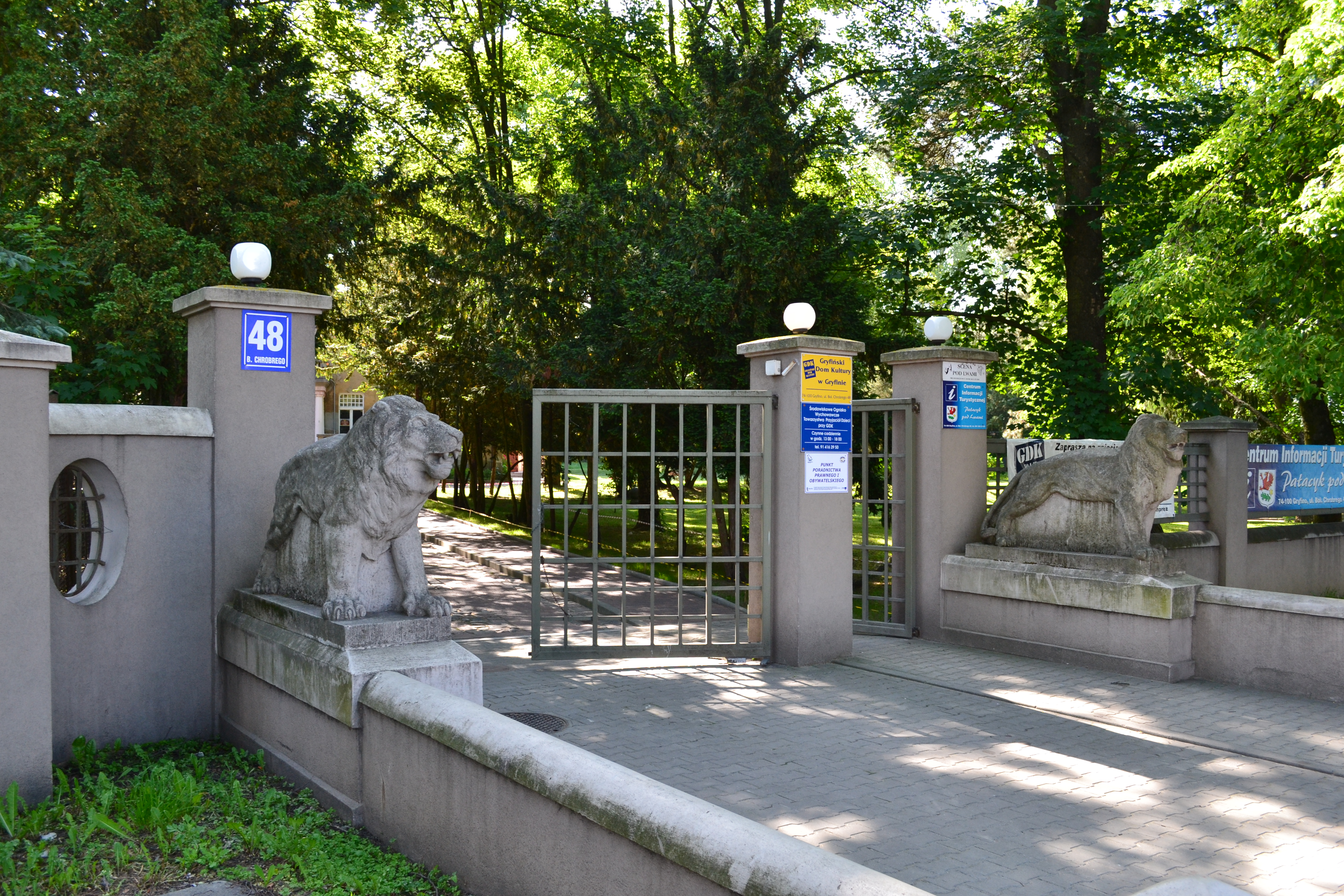 Pałacyk pod Lwami; Gryfino ul. Bolesława Chrobrego 48